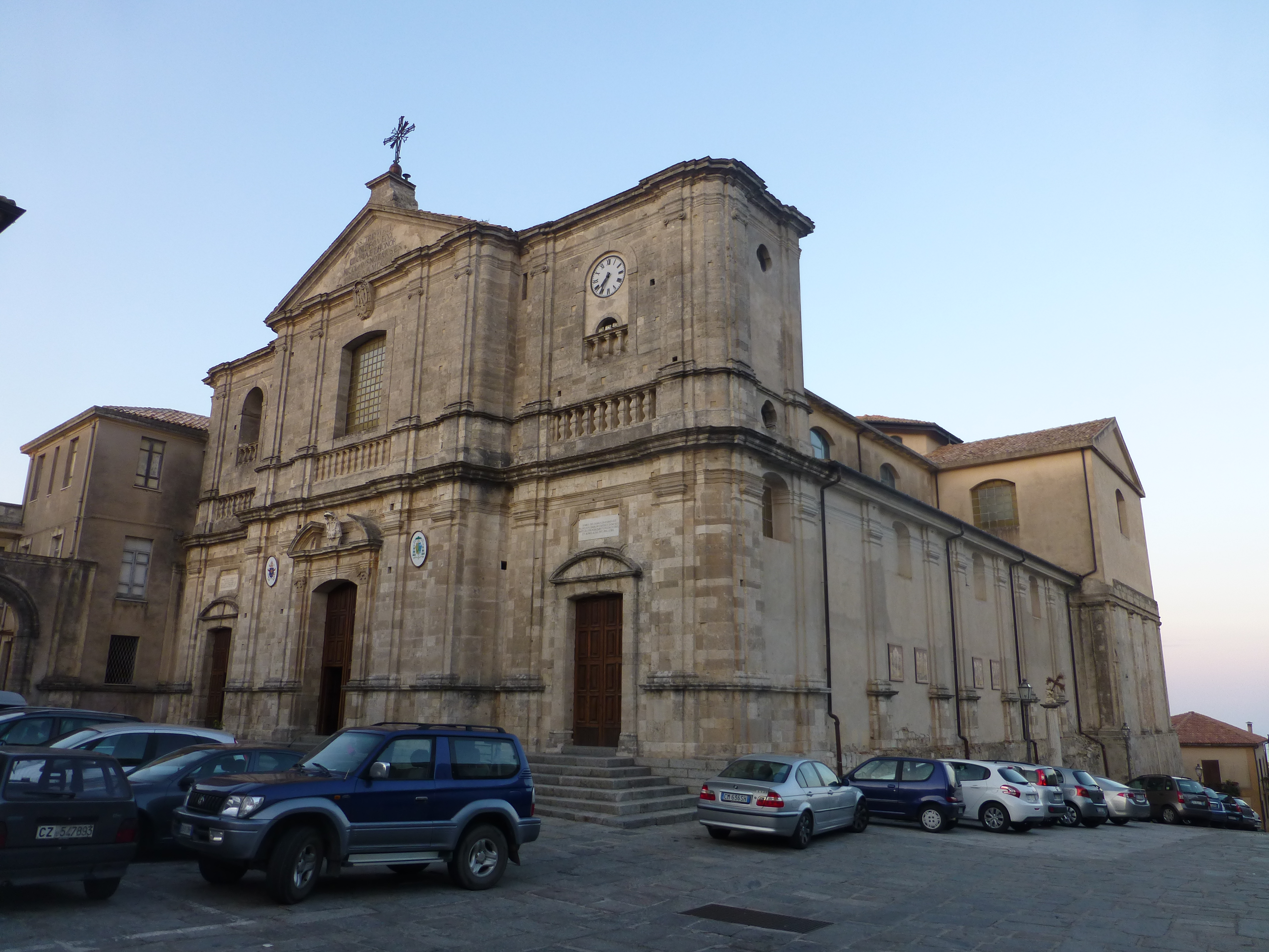 Cattedrale di Squillace